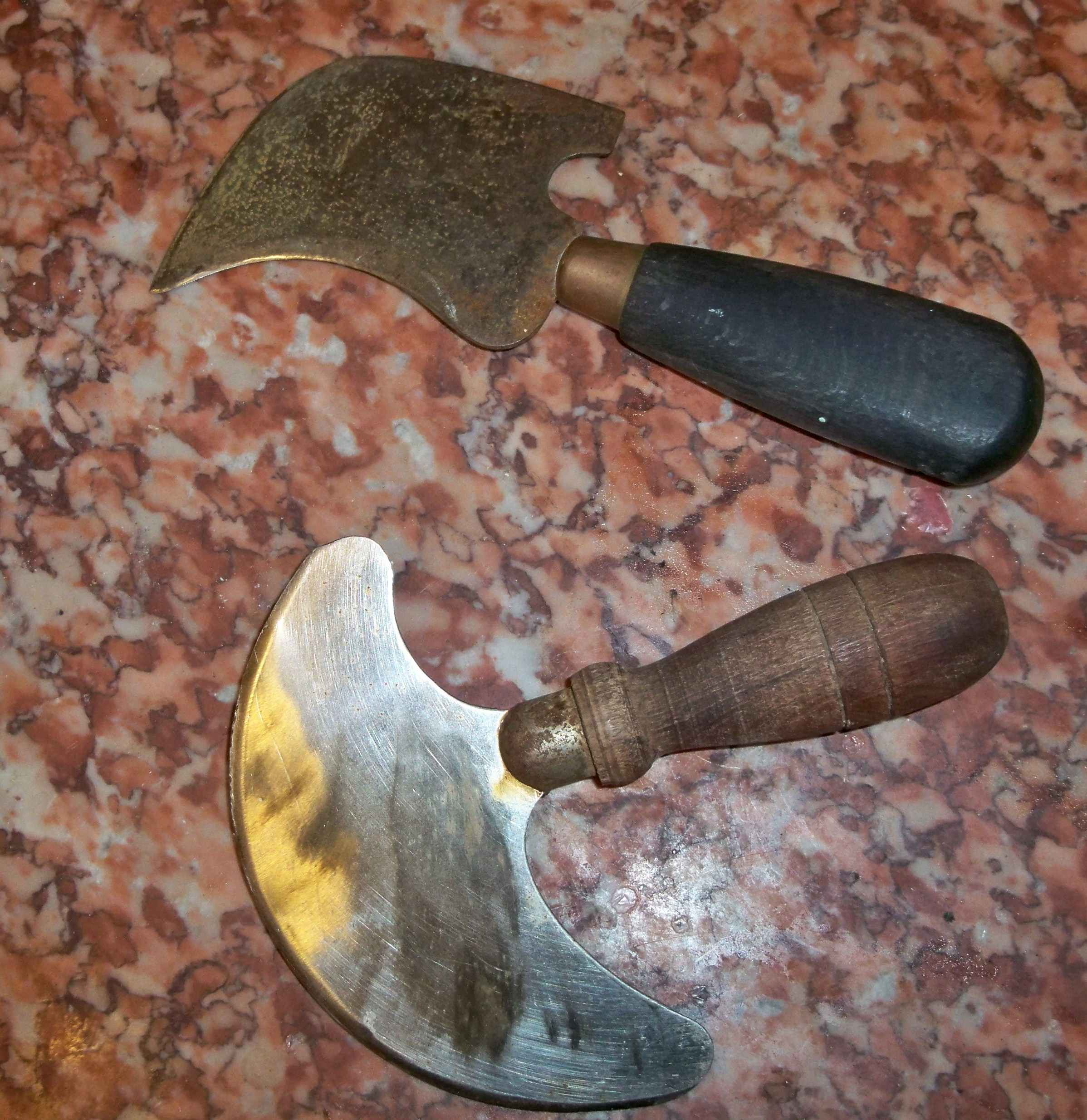 Tranchet et hachoir